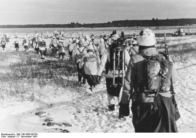 Rußland, 17.11.1941 Mit Schneehemden getarnte Infanteristen im Anmarsch auf die befohlene Ausgangsstellung. Heeresfilmstelle-Bildarchiv/Neg.-Nr.: P.K.167/32 Bildberichter Vorphal. P.B.Z.